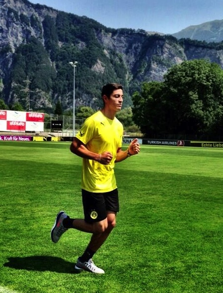 Koray Günter, wenn er ausgeführt wird